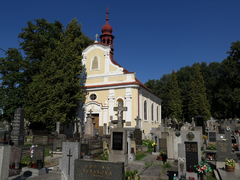 Kaple svatého Michaela Archanděla, Hřbitovní, Klatovy II, Klatovy.